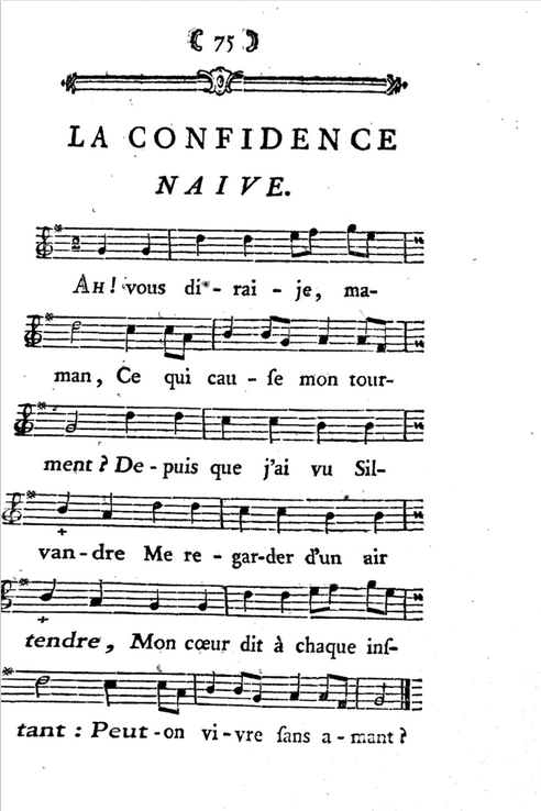 premiére publication du chanson "Ah ! vous dirai-je, maman" en M. De Lusse: Recueil de Romances, tome second, Bruxelles 1774, page 75